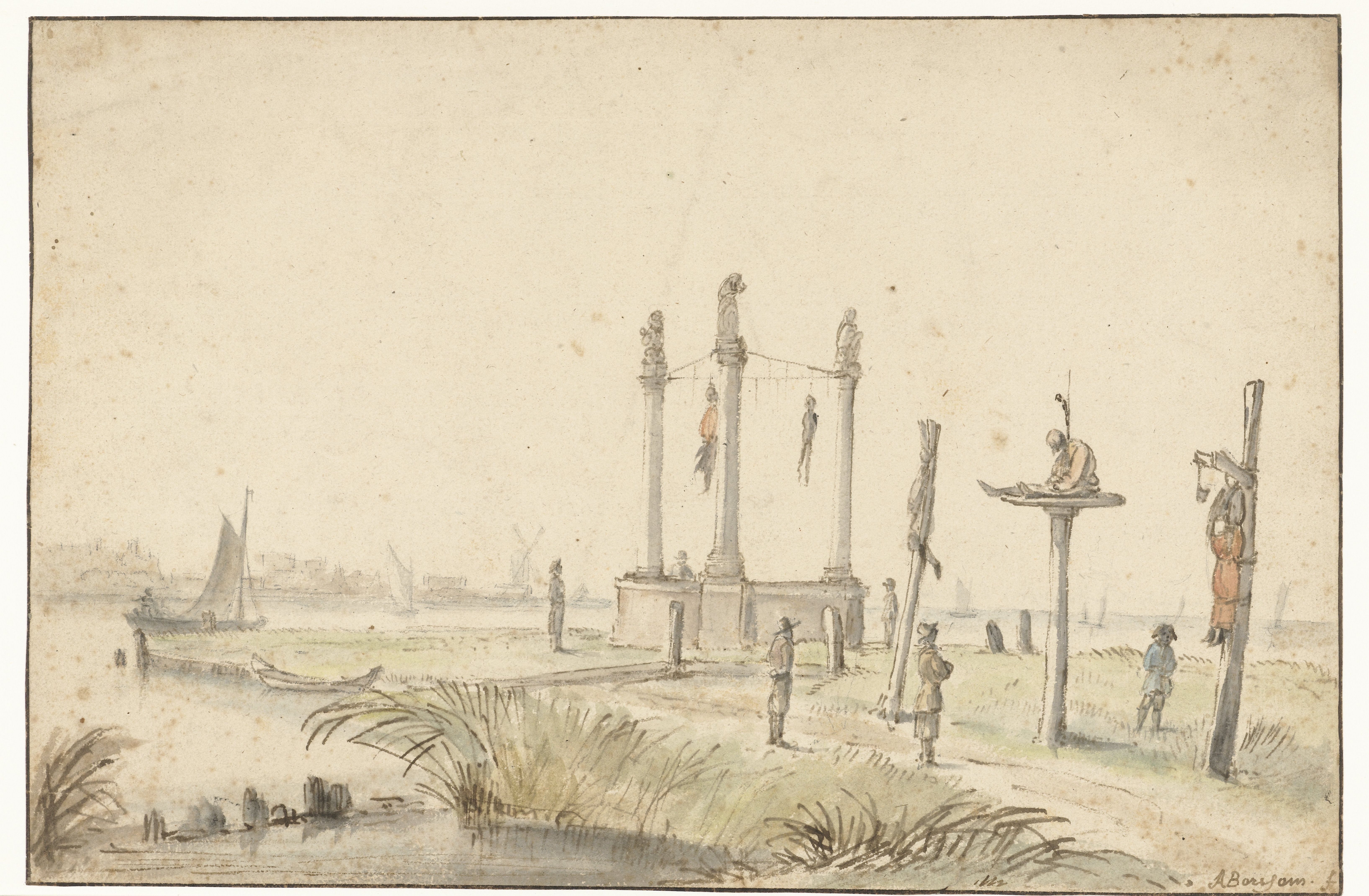 IdentificatieTitel(s): Galgenveld aan de rand van de VolewijkObjecttype: tekening Objectnummer: RP-T-1954-182VervaardigingVervaardiger: tekenaar: Anthonie van BorssomDatering: 1664 - 1665Fysieke kenmerken: pen in bruin, penseel in waterverfMateriaal: papier waterverf inkt Techniek: pen / penseelAfmetingen: h 205 mm × b 318 mmOnderwerpWaar: VolewijkVerwerving en rechtenVerwerving: aankoop 1954Copyright: Publiek domein